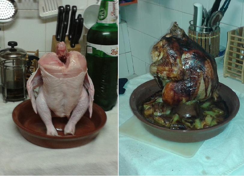 Κοτόπουλο σε γιουβέτσι πουλερικών πριν & μετά το ψήσιμο